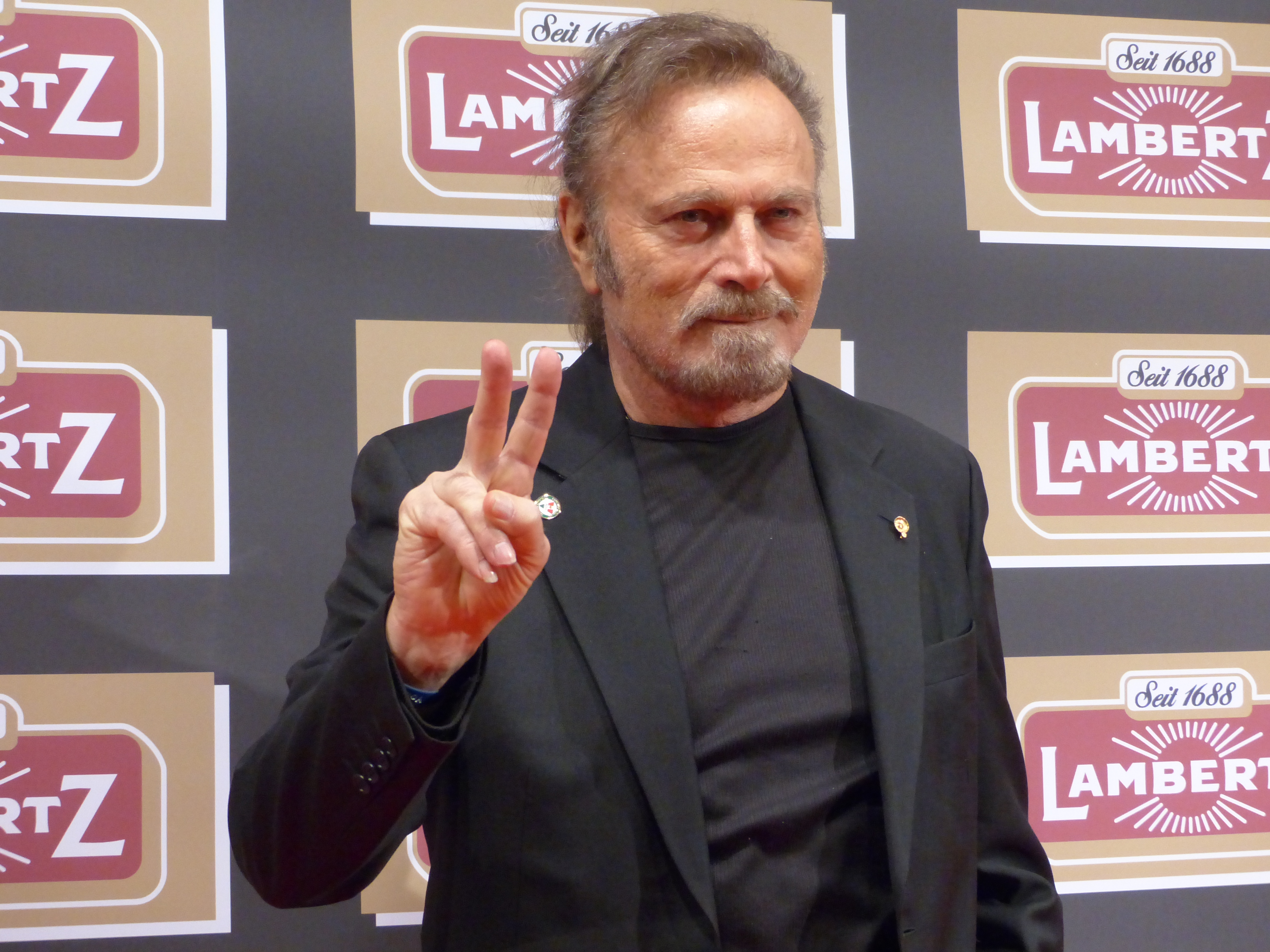 Franco Nero bei der Lambertz Monday Night, im Februar 2016.